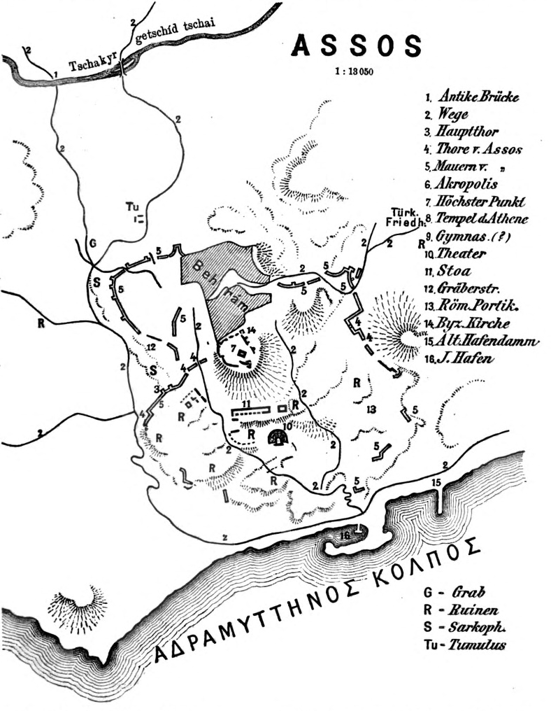 Übersichtsplan der Stadt Assos in der Troas, gezeichnet von Ludwig Bürchner (1896)